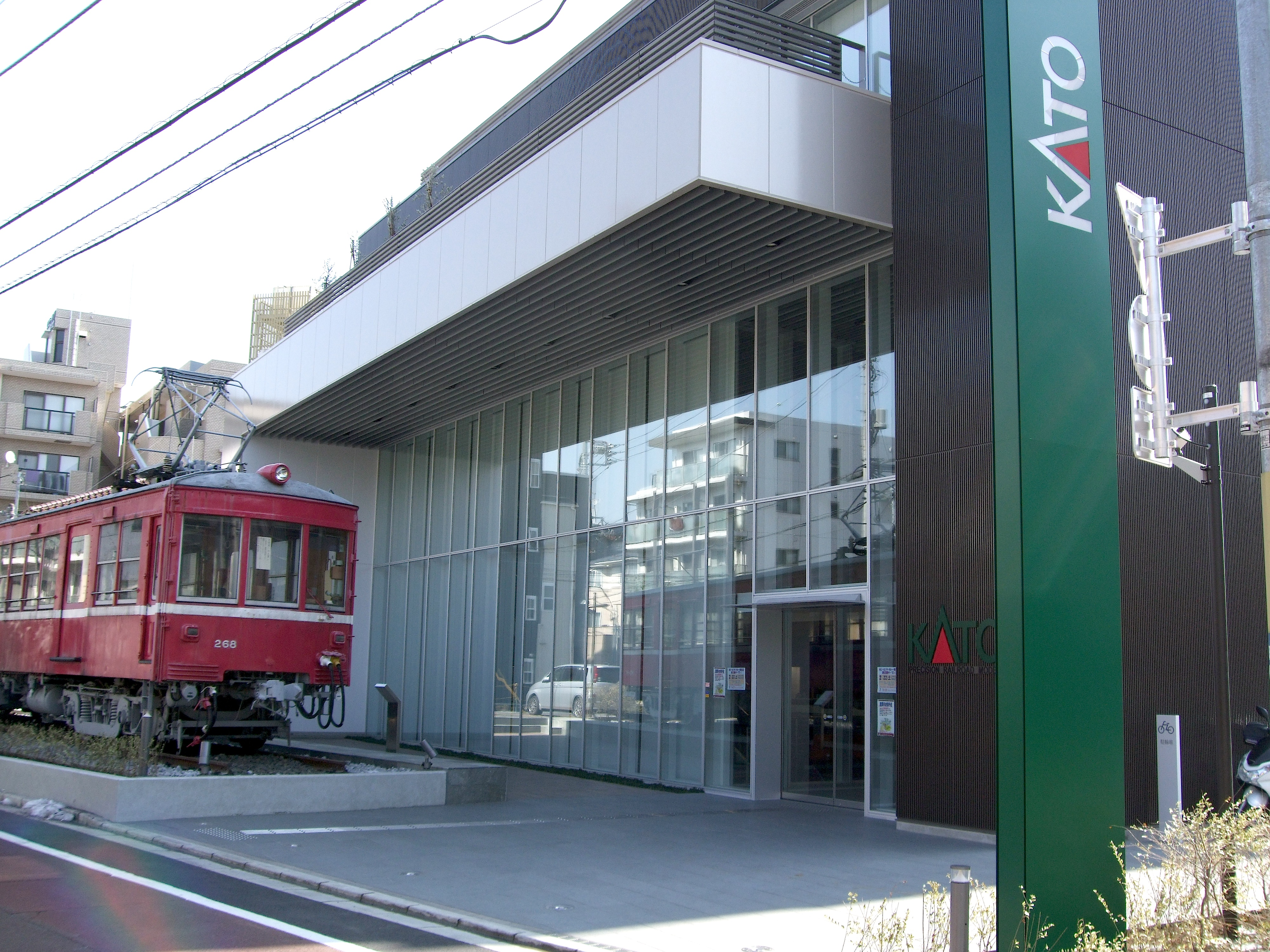 関水金属本社・ホビーセンターカトー東京店